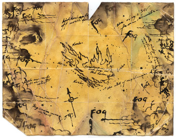 mapa da ilha da caveira do filme King Kong de 2005